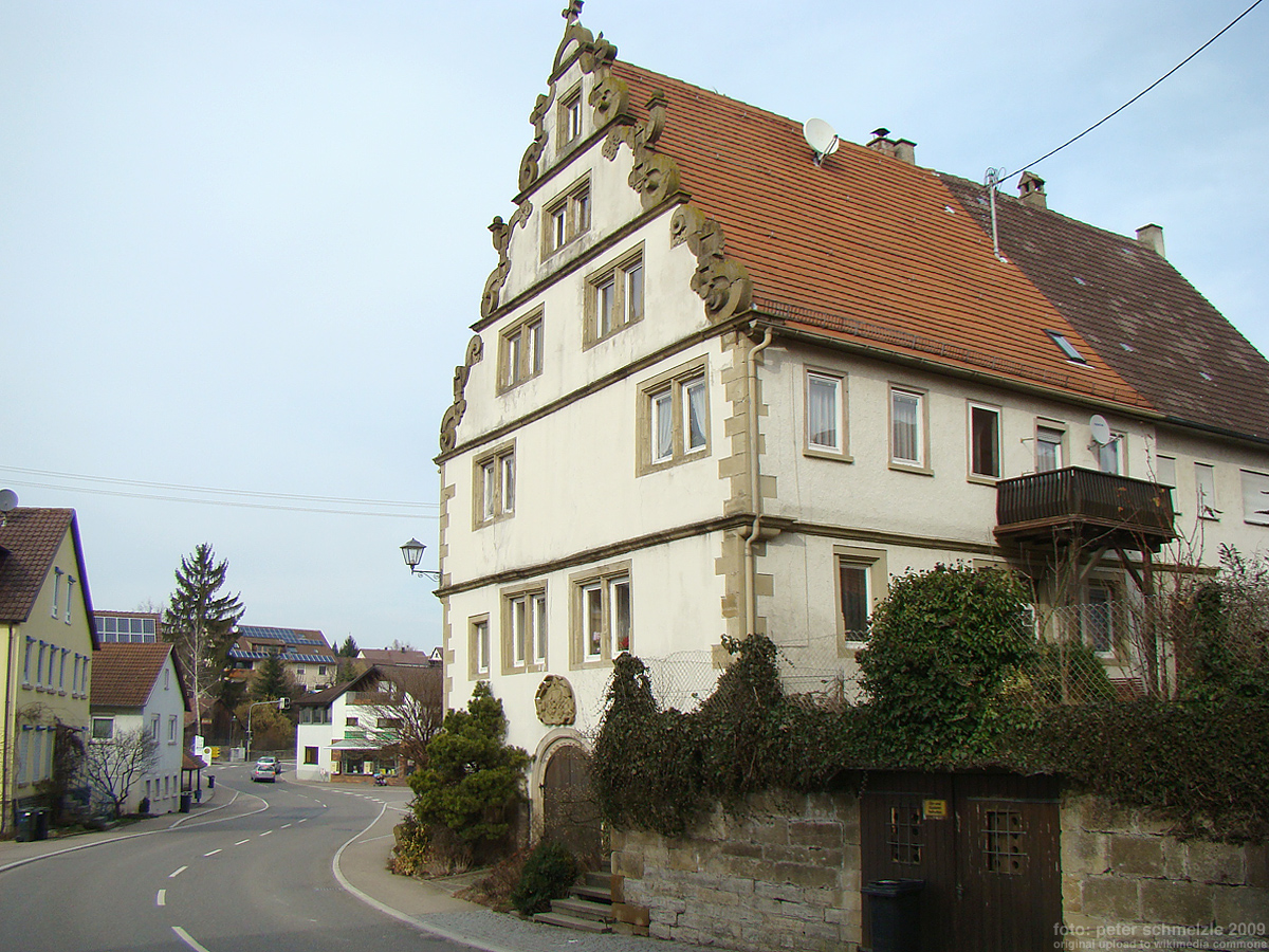 Chanowskysches Schhlösschen in Langenbrettach-Brettach